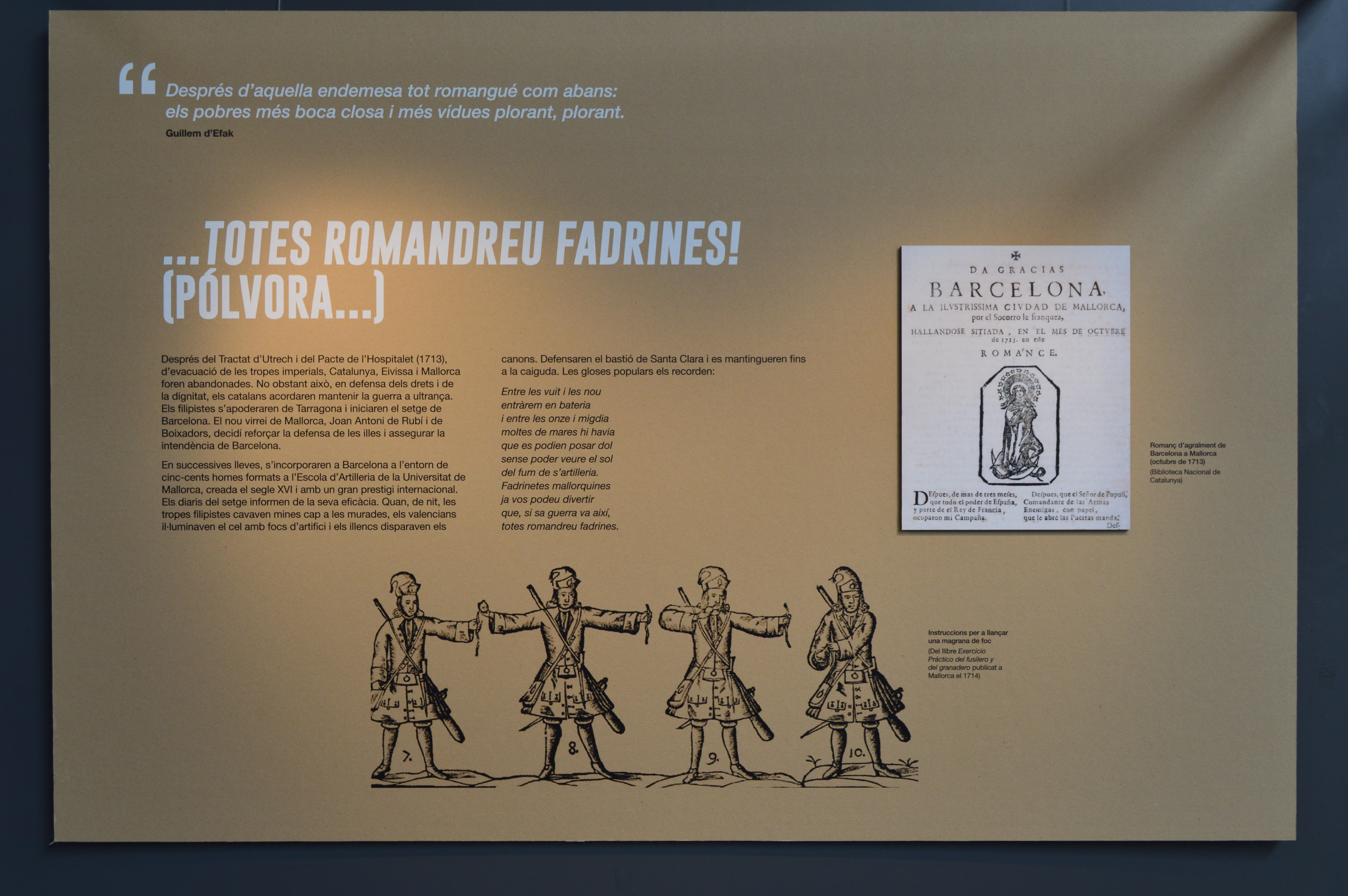 Cinquè plafó de l'exposició del Born Centre Cultural sobre l'ocupació borbònica de Mallorca el 1715.